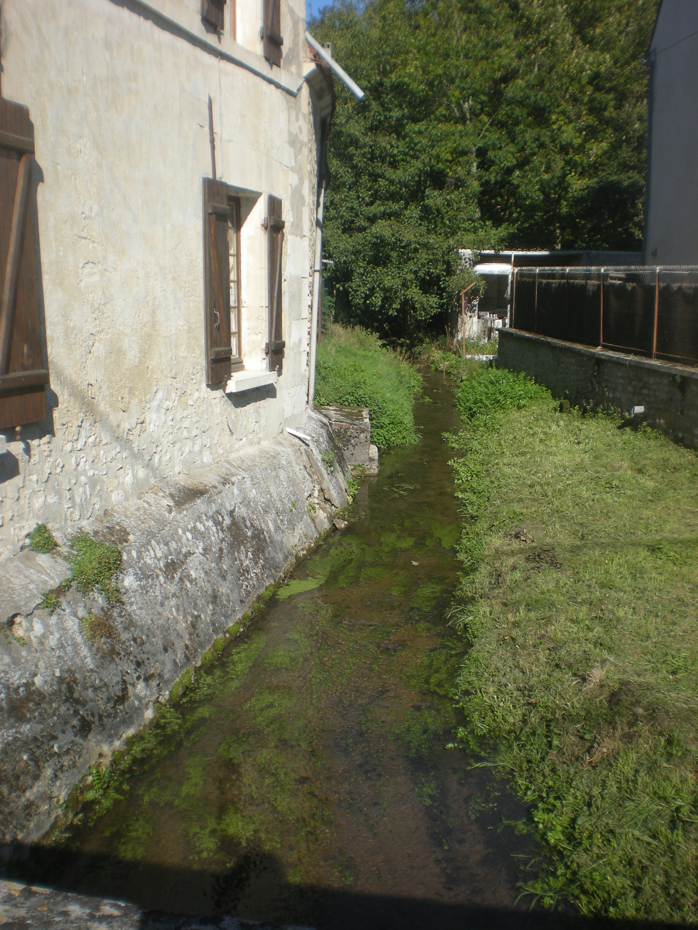 un ruisseau à Ansacq (Oise)